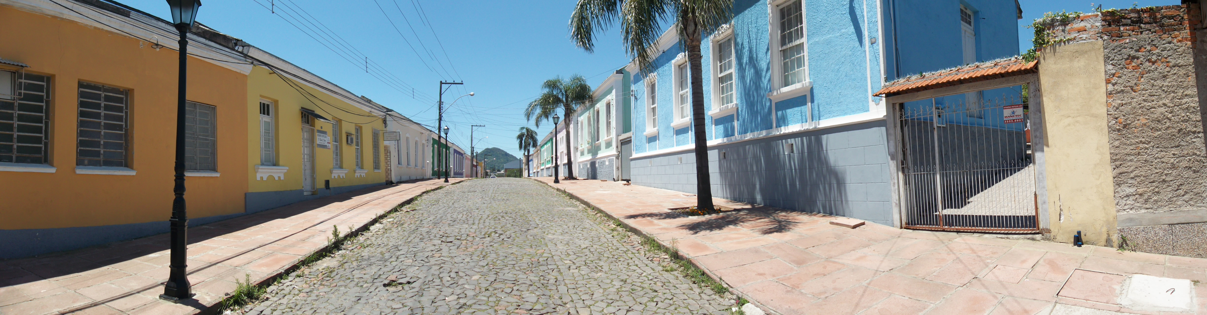 Panorama da Vila Belga, em Santa Maria / RS, Brasil